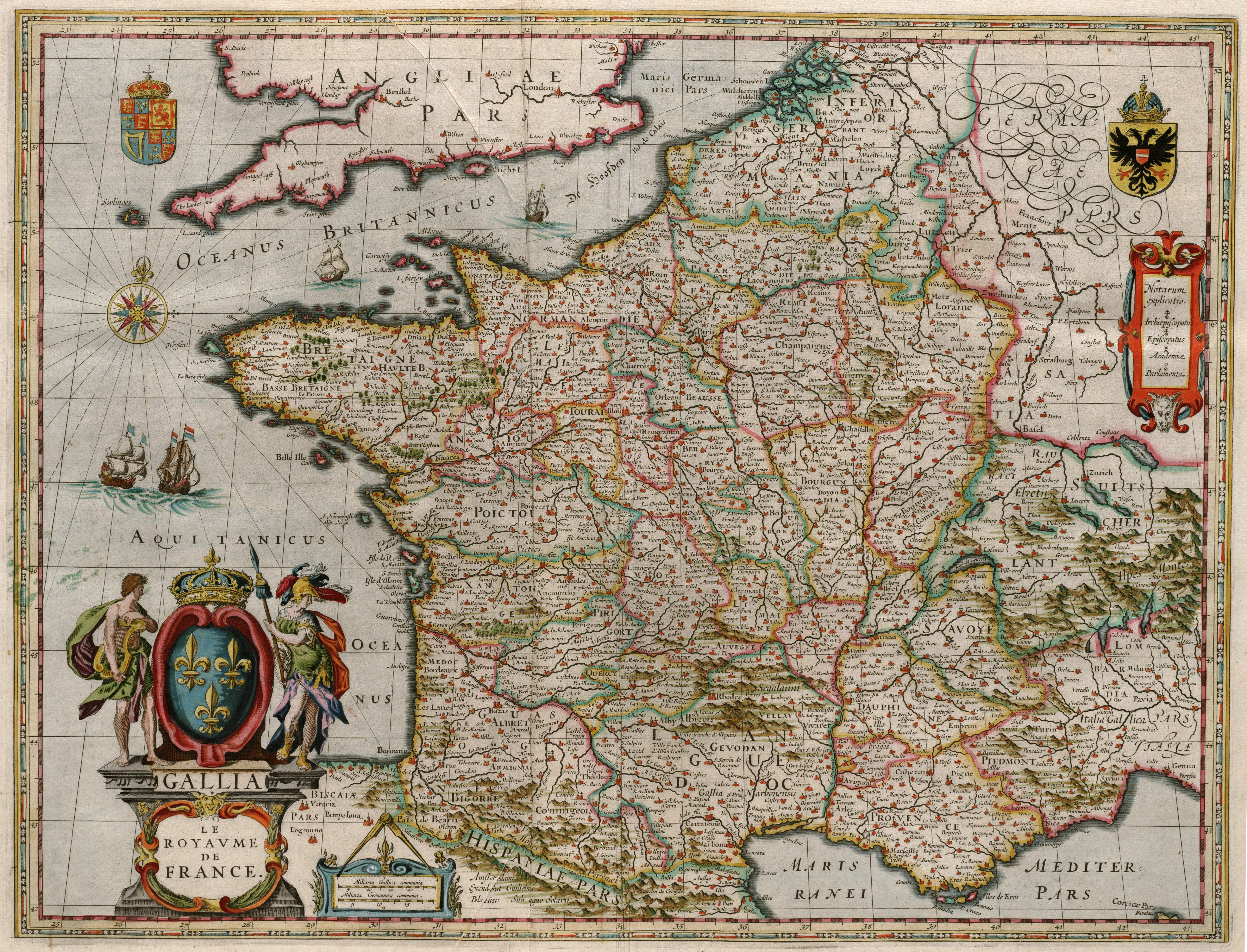 Gallia : page 4 de la deuxième partie du Théatre du Monde, ou Nouvel Atlas (Toonneel des Aerdrycks, ofte Nieuwe Atlas) de Willem & Johannes Blaeu. Amsterdam. 1649